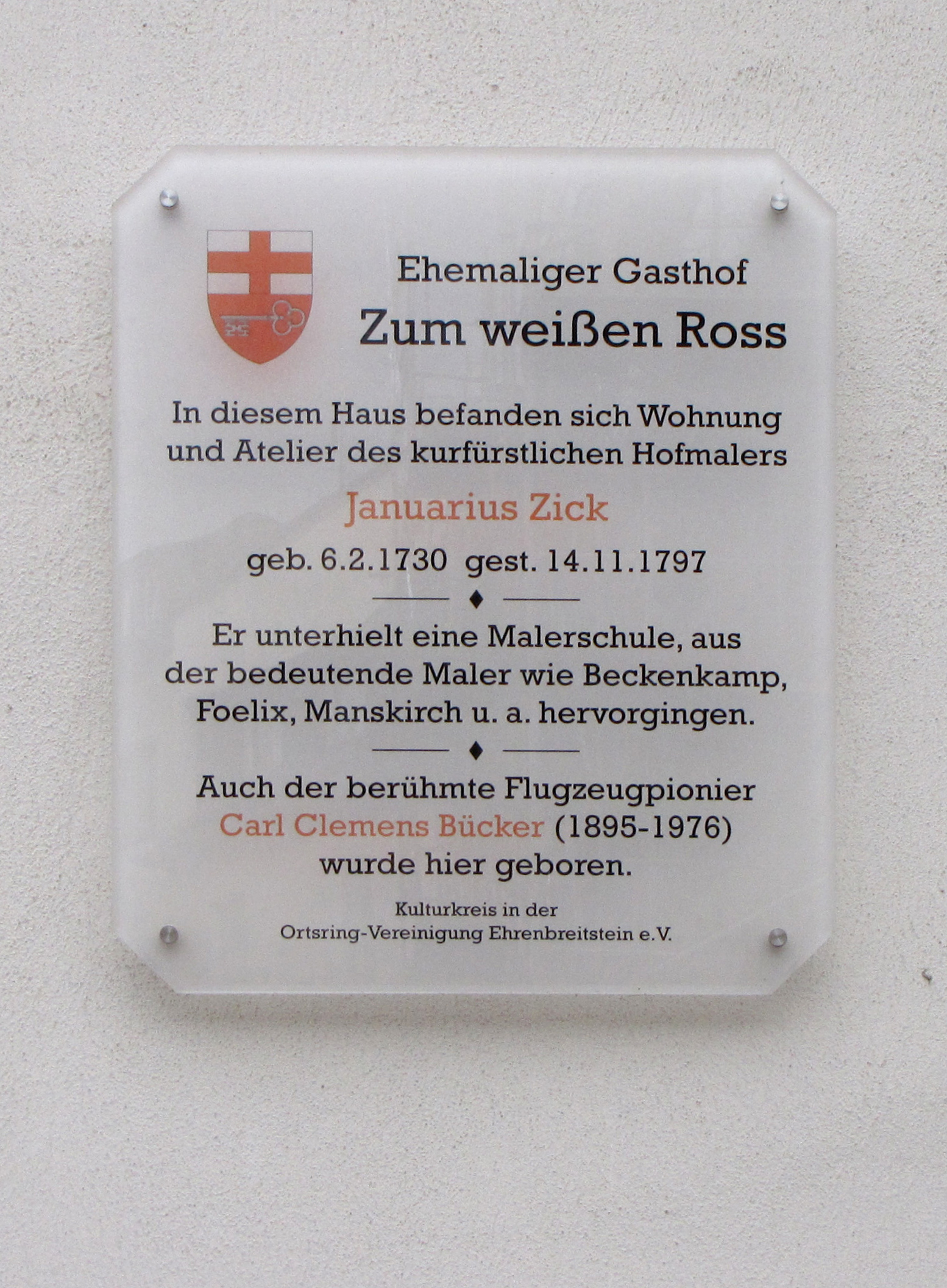 Plakette am Geburtshaus von Clemens Buecker